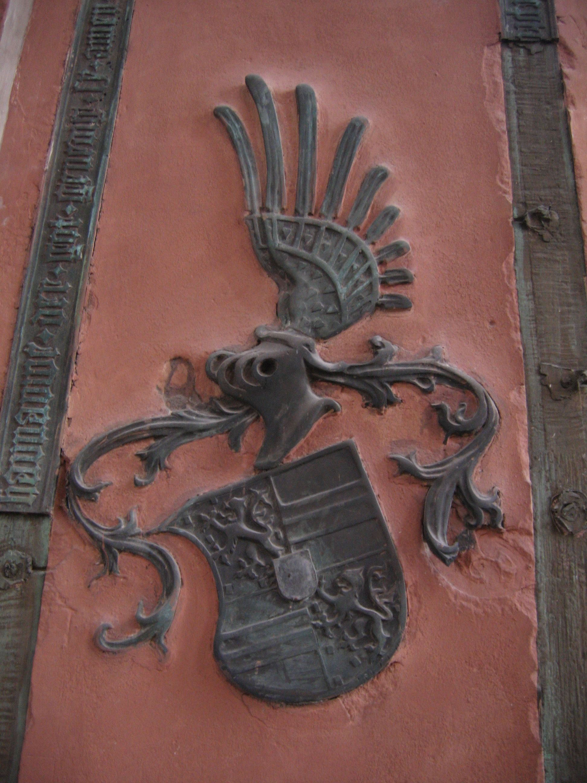 Wappen der Gräfin Adriana von Nassau von ihrer Grabplatte in der Marienkirche in Hanau